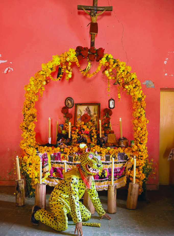 Altar de muertos amuzgo, Costa Chica de Guerrero.